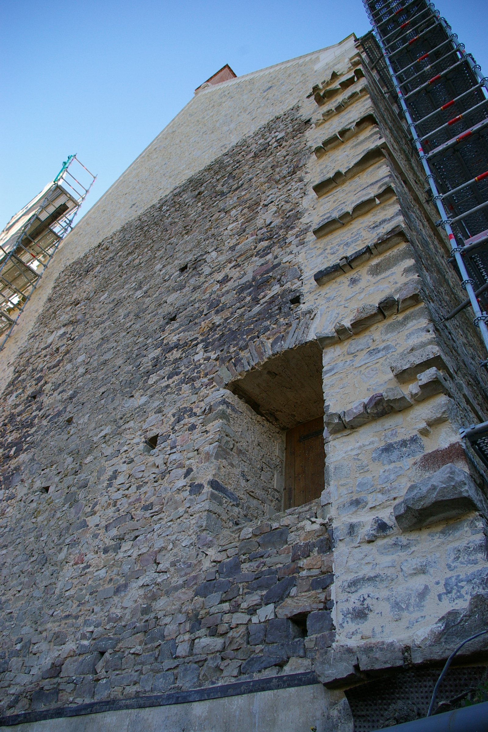 Pierres d'attente du logis de Fouquet de la Varenne à Ste-Suzanne (Mayenne - France)